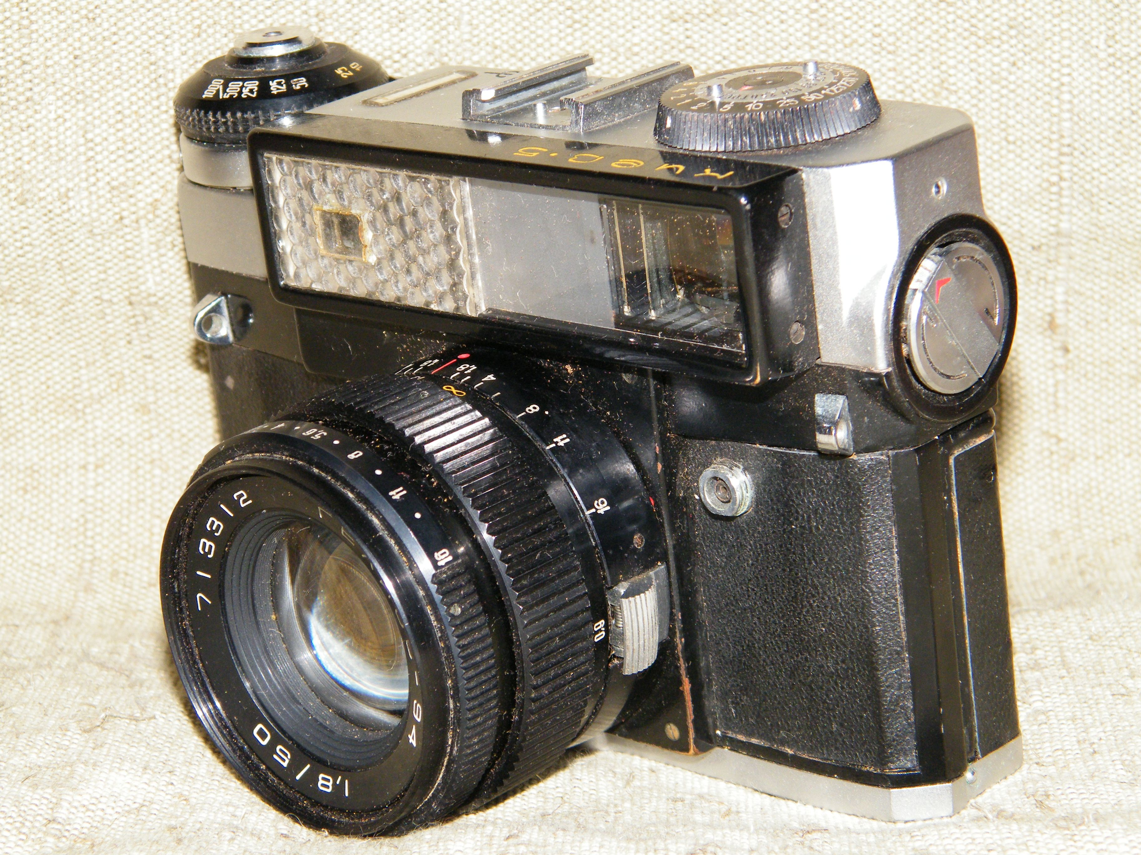 Kiev 5 rangefinder